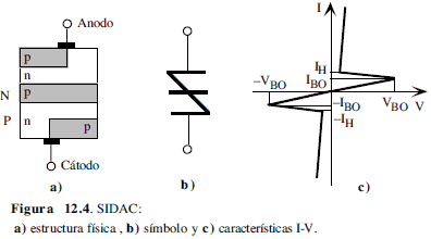 خواص عنصر SIDAC